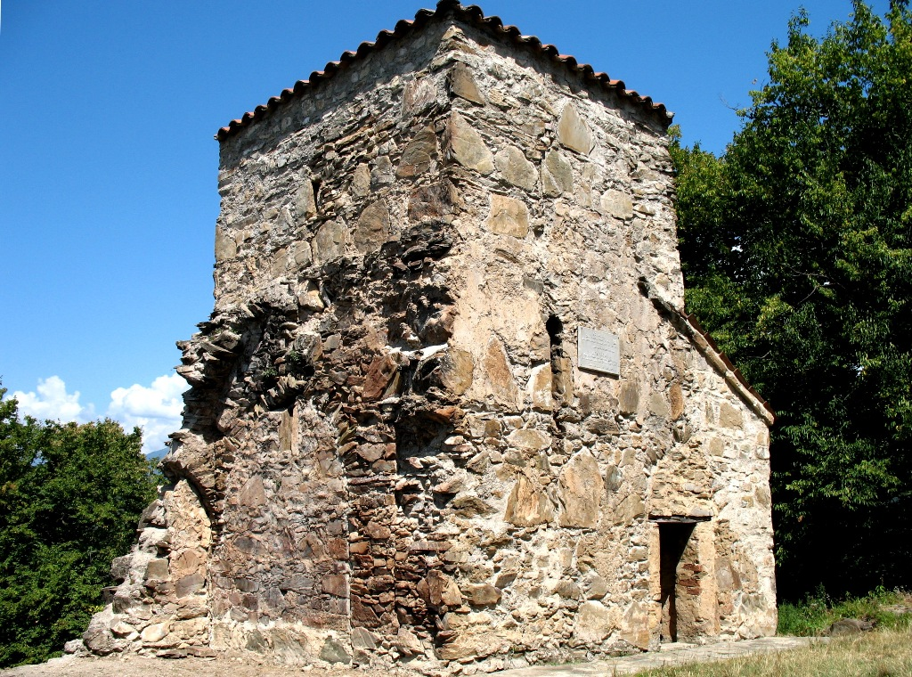 ნეკრესი